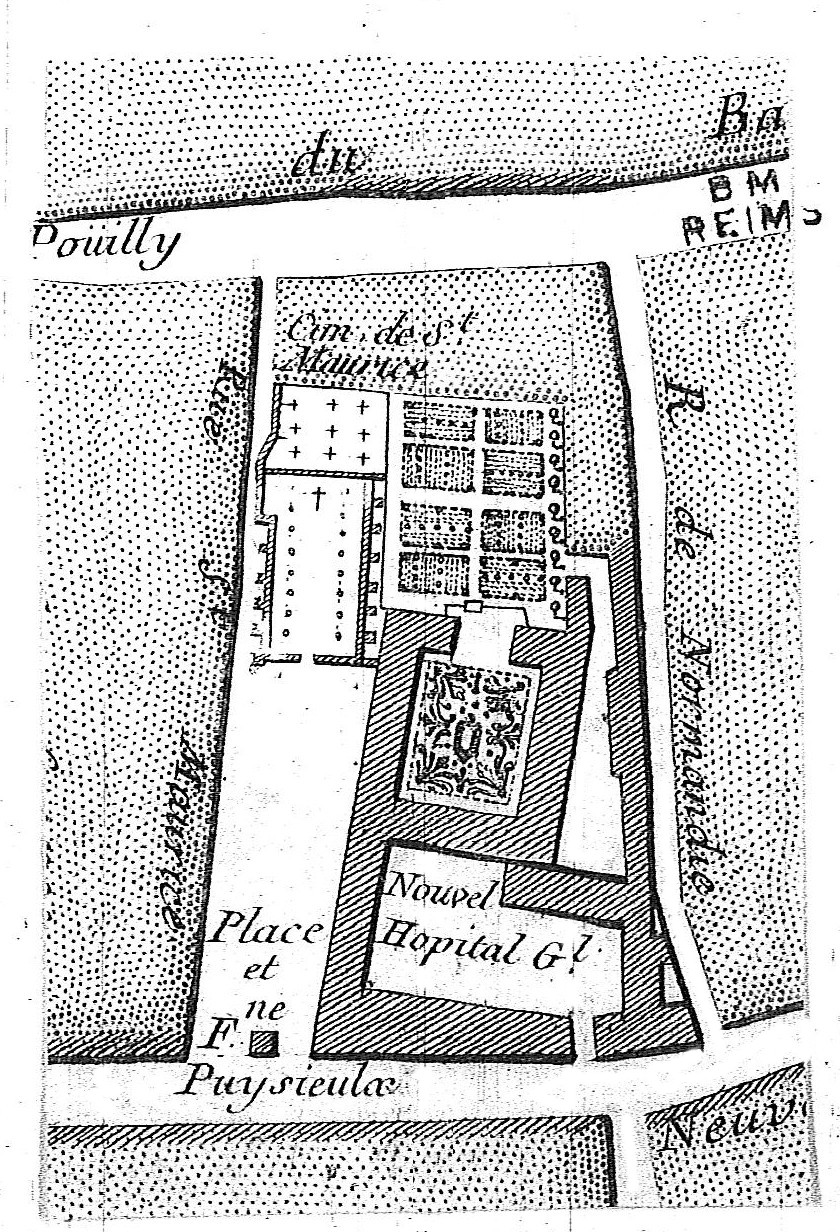 image de l'ancien collège .